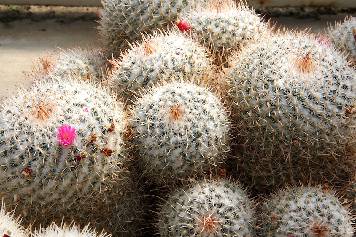 Mammillaria geminispina ssp. geminispina